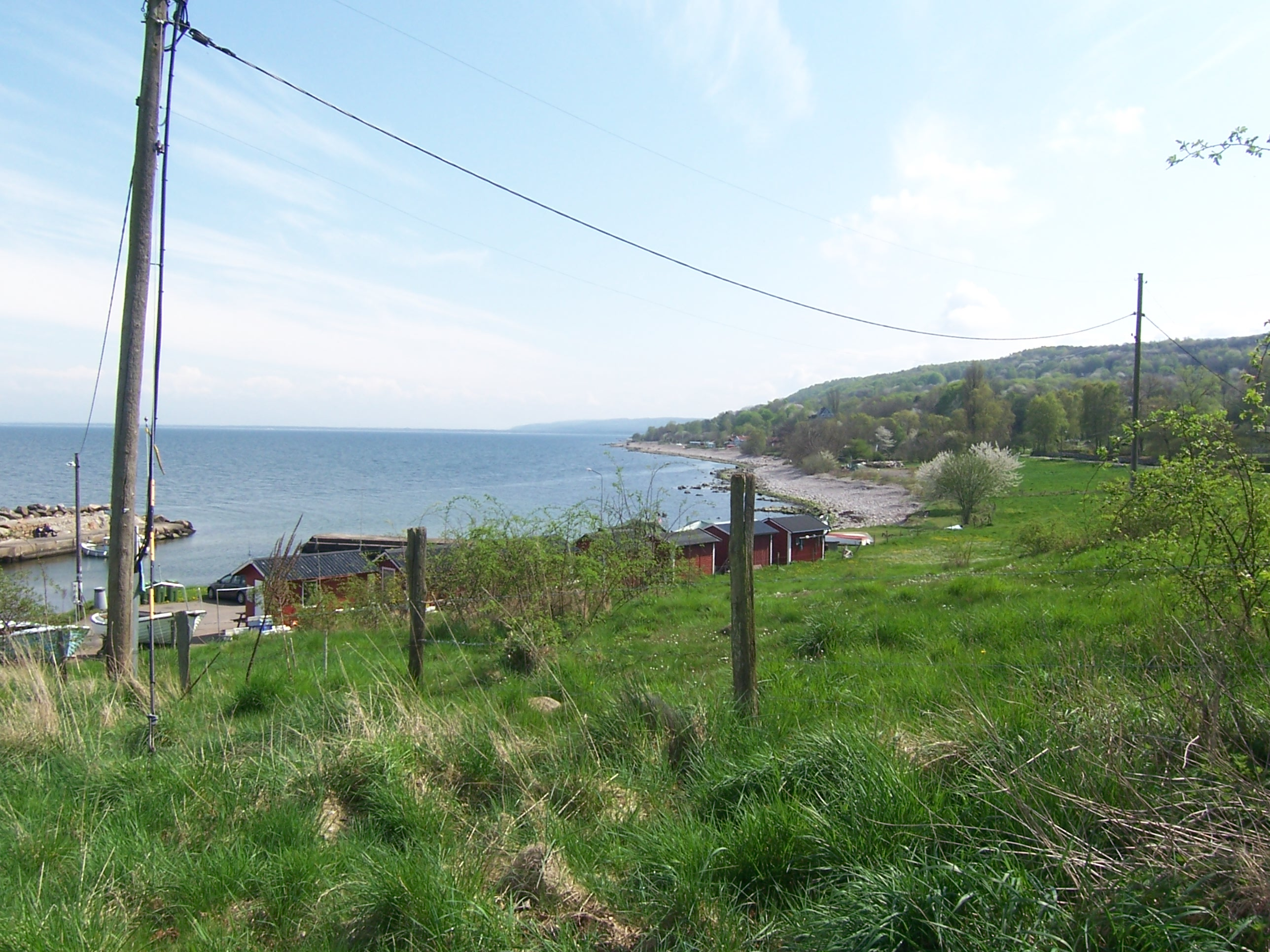 Sea near Kattvik, Skåne, Sweden